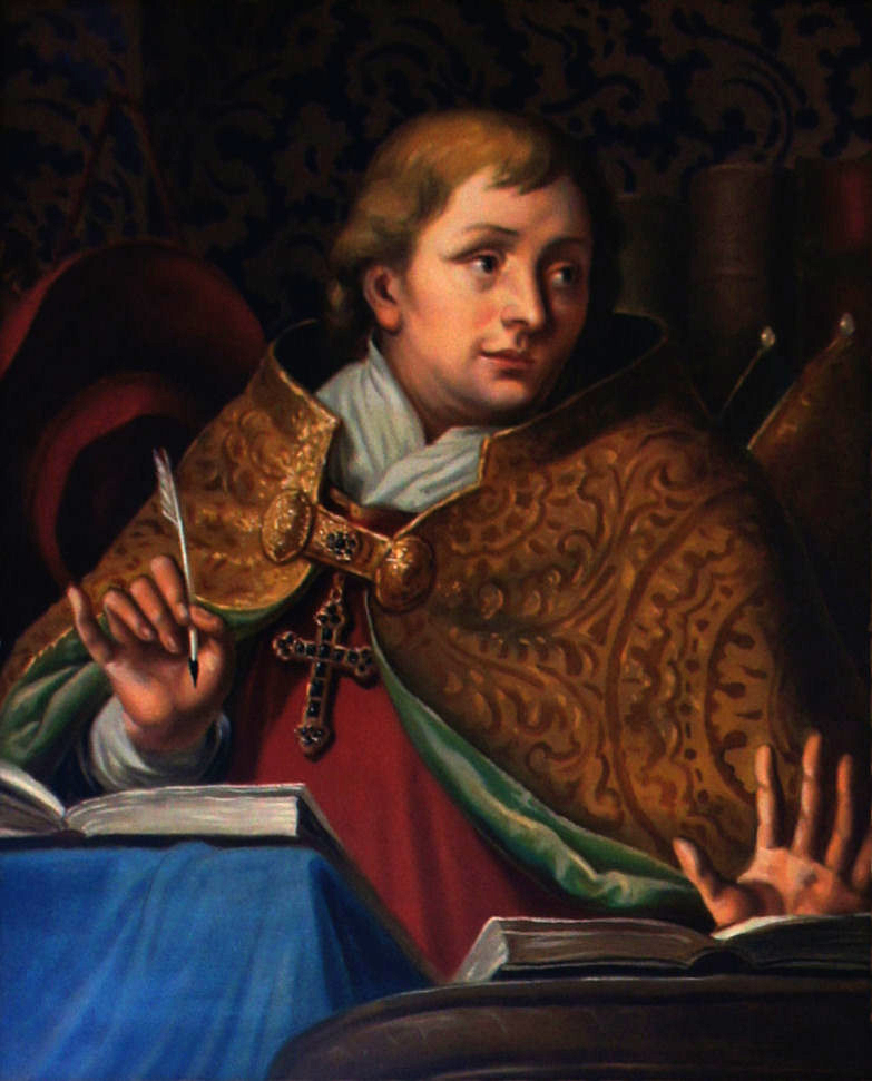 Porträtgemälde von Johannes III. Grünwalder, Fürstbischof von Freising, im Fürstengang zwischen Fürstbischöflicher Residenz und Freisinger Dom.